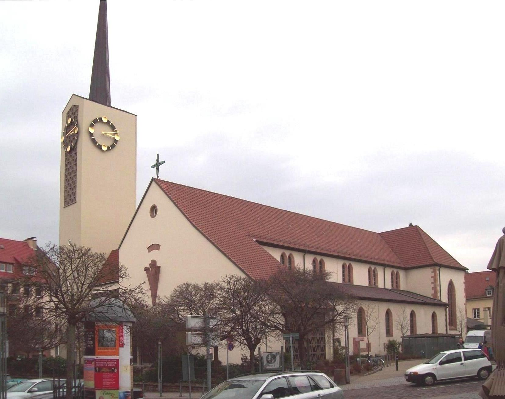 St. Agatha Aschaffenburg (Blick vom Agathaplatz)